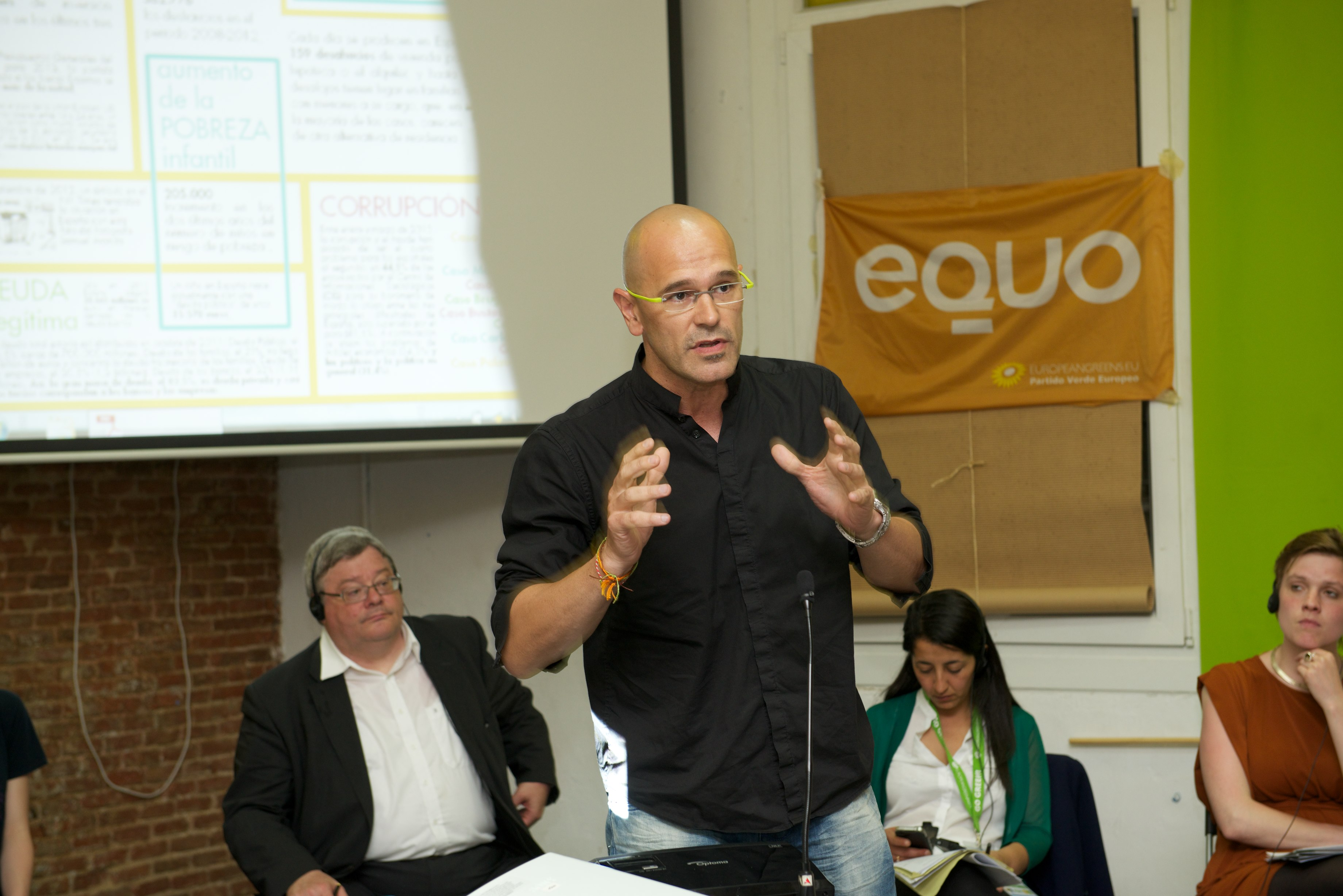 GLB_2854